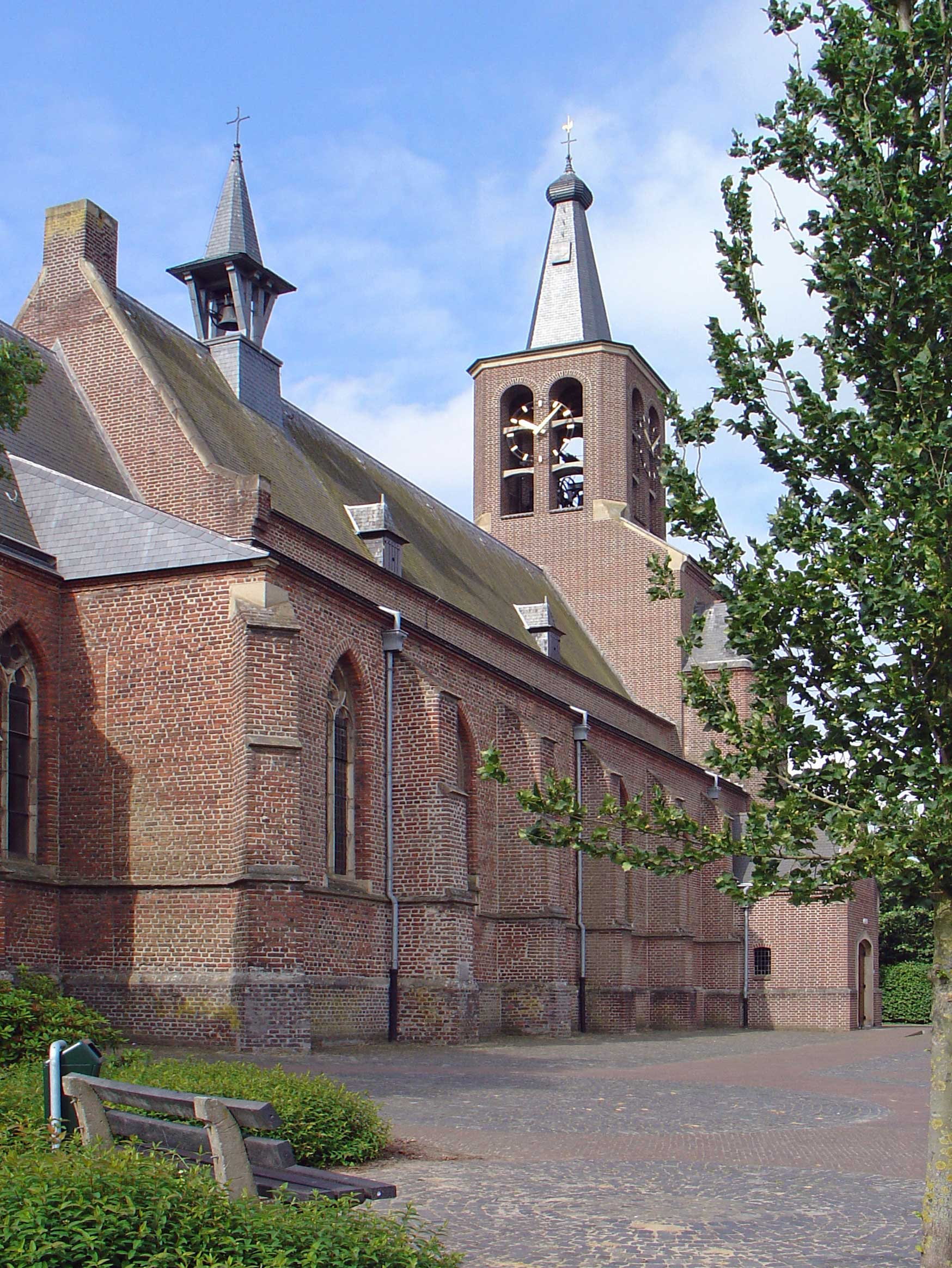 Lambertuskerk in Swolgen (Limburg)